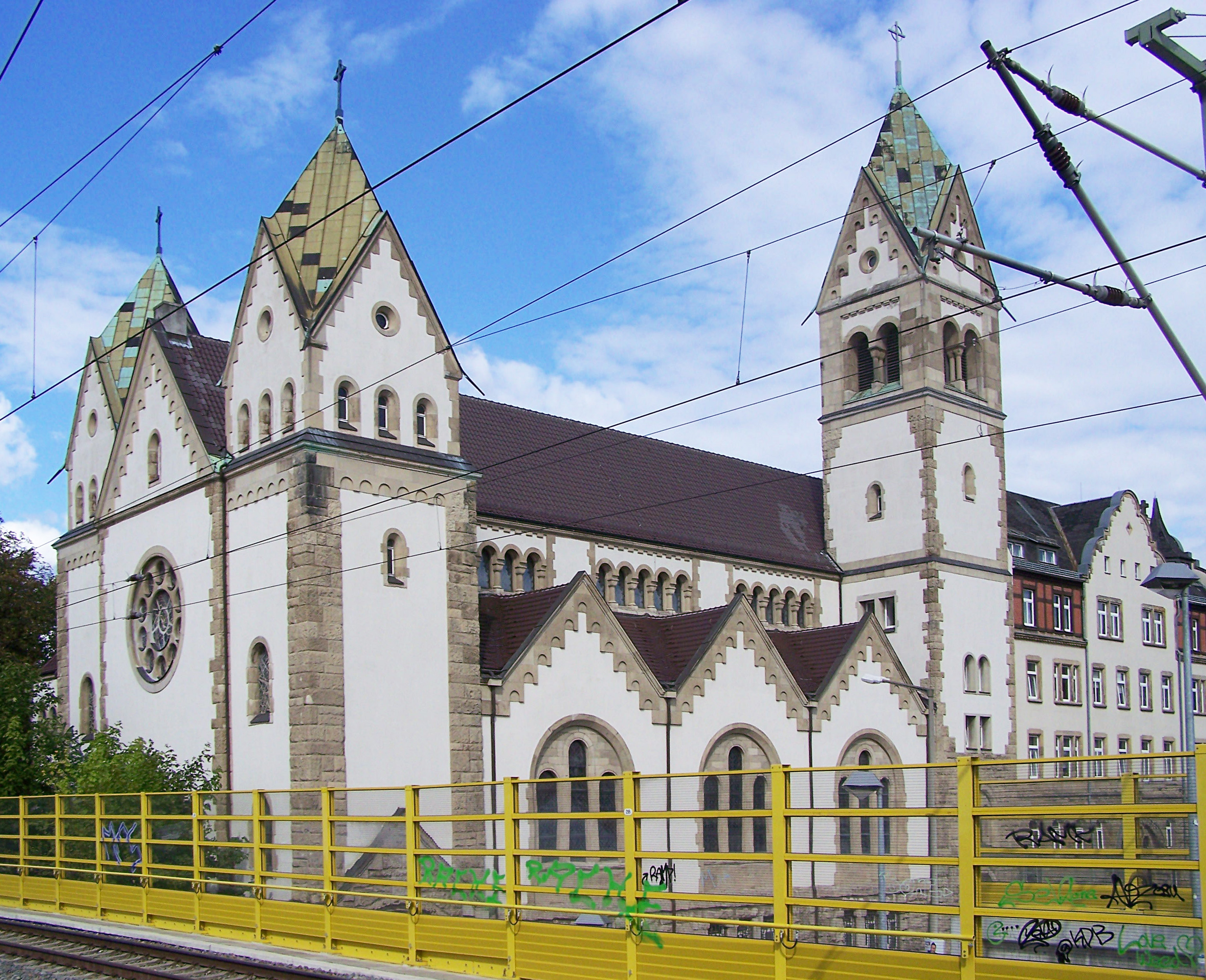 Kath. Pfarrkirche (Liebfrauenkirche) in Leipzig-Plagwitz (Karl-Heine-Straße 112 vom Bahnhof Plagwitz aus gesehen)